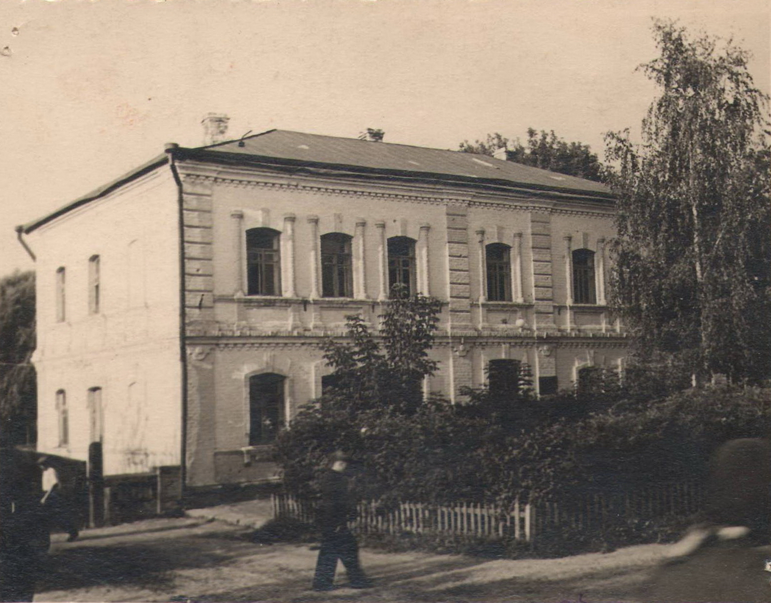 м. Лохвиця. Будинок колишнього Гостинного двору (побуд на поч. ХХ ст.). Сьогодні в даному приміщенні - районний відділ освіти.